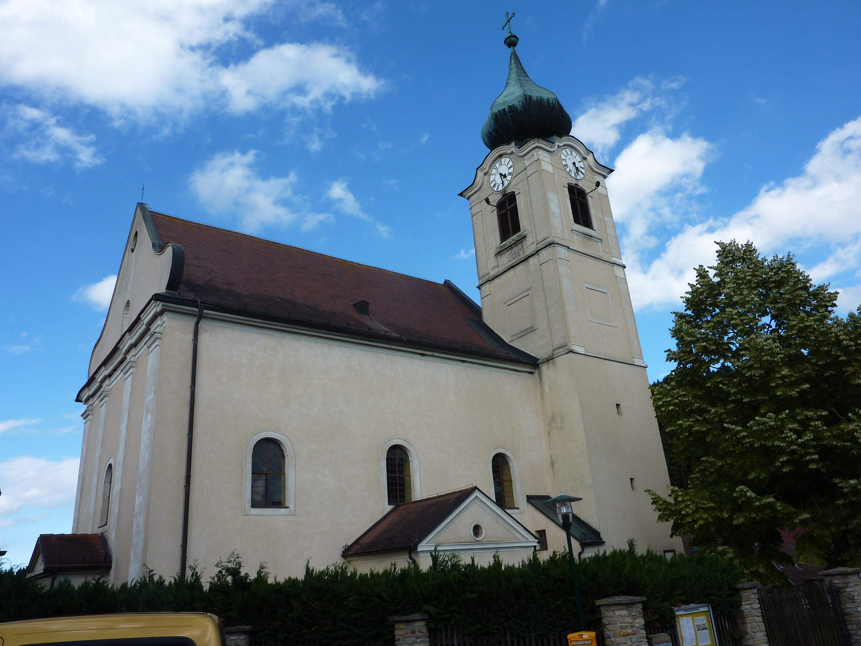 Pfarrkirche Niedergrünbach, Rastenfeld, Niederösterreich